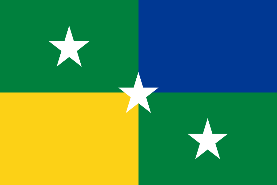 Bandera de Cuyabeno